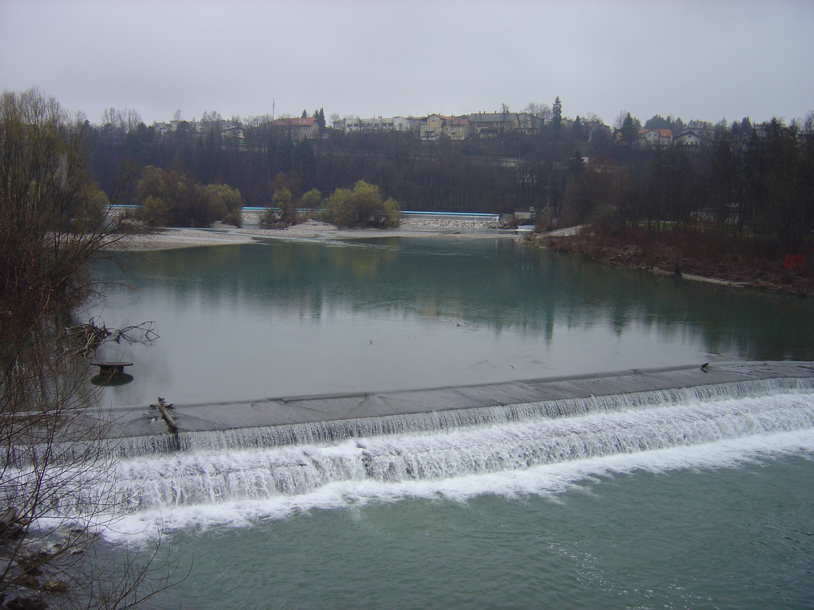 Kranj, Slovenia